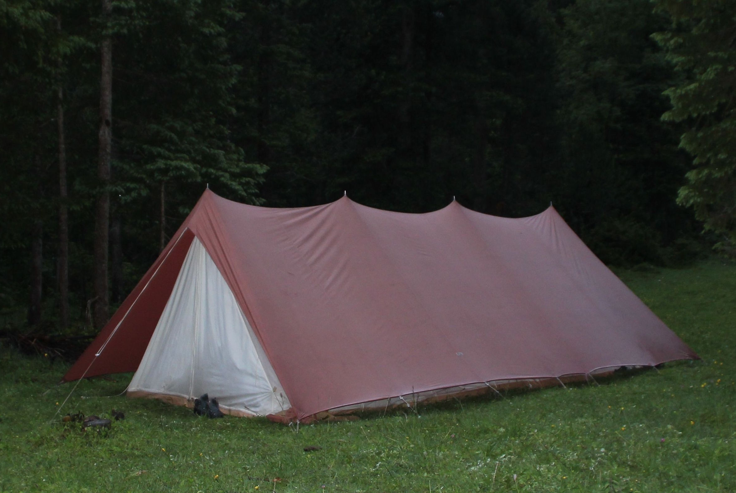 Achterzelt von Spatz Camping & Outdoor